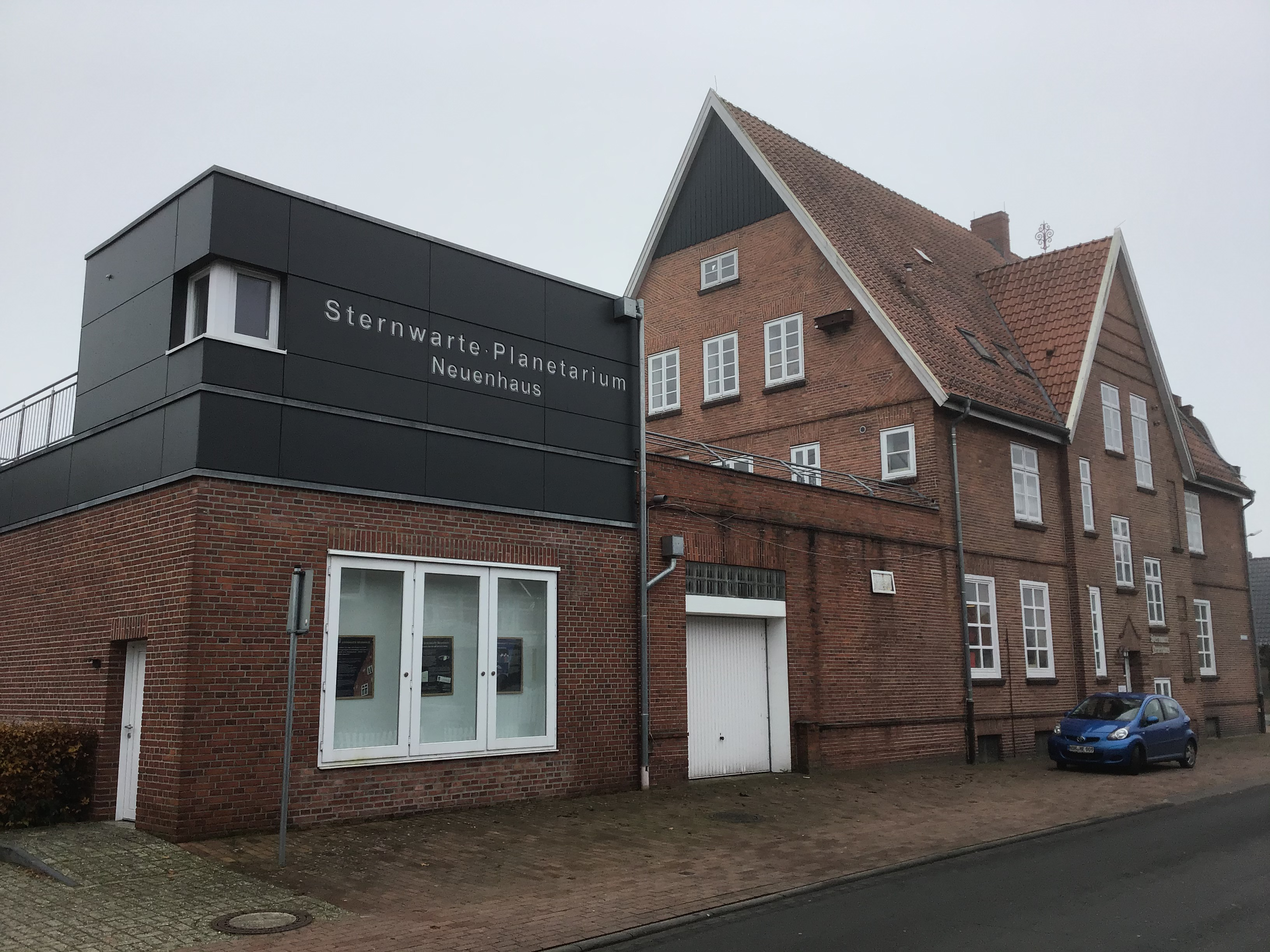 Sternwarte Neuenhaus, Gebäude, im Dezember 2019